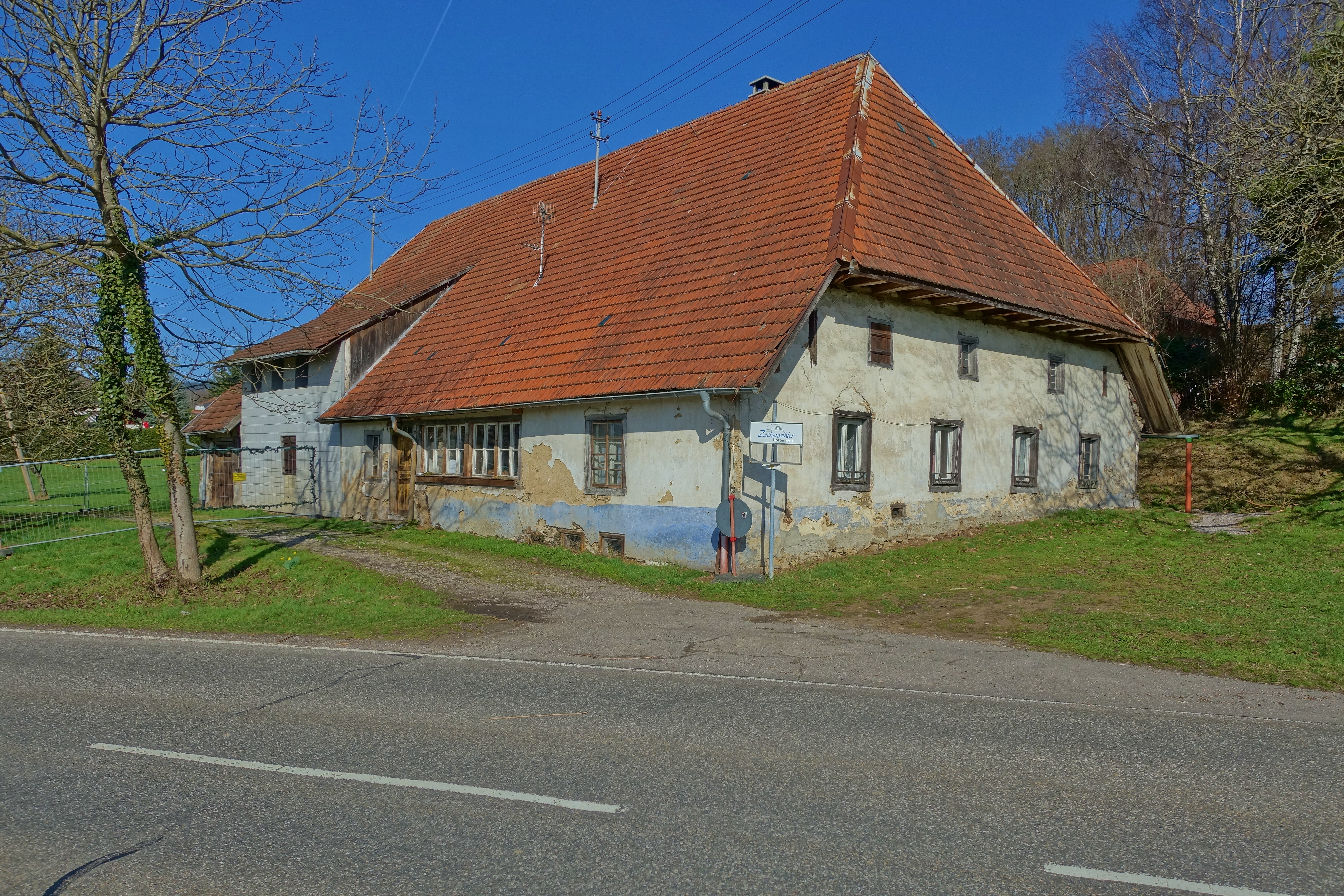 Das 1748 erbaute Zechenwihler Hotzenhaus auf der Gemarkung Zechenwihl in Murg-Niederhof ist eines der letzten seiner Art und soll zur Kulturstätte umgebaut werden. Das Zechenwihler Hotzenhaus ist als typisches Schwarzwaldhaus ein einzigartiges Zeitzeugnis. Obwohl es in der Vergangenheit mehrfach umgebaut wurde, ist das fast 300 Jahre alte Haus noch weitgehend im Originalzustand.